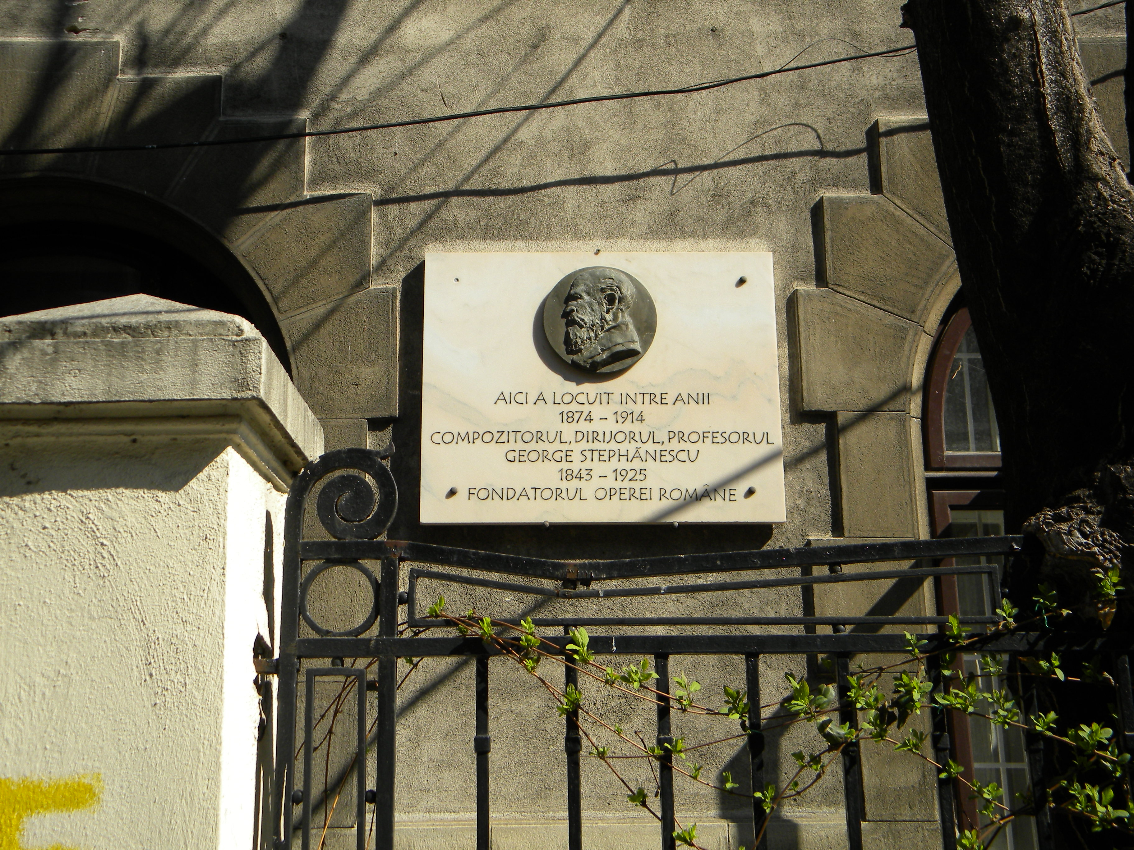 Bucuresti, Romania, Placa Comemorativa pentru, compozitorul, dirijorul si profesorul George Stephanescu (Str. Pitar Mos)